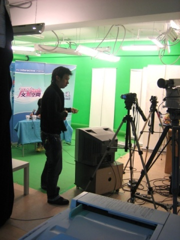 香港互動電視（TICTV）廠景TICTV Studio